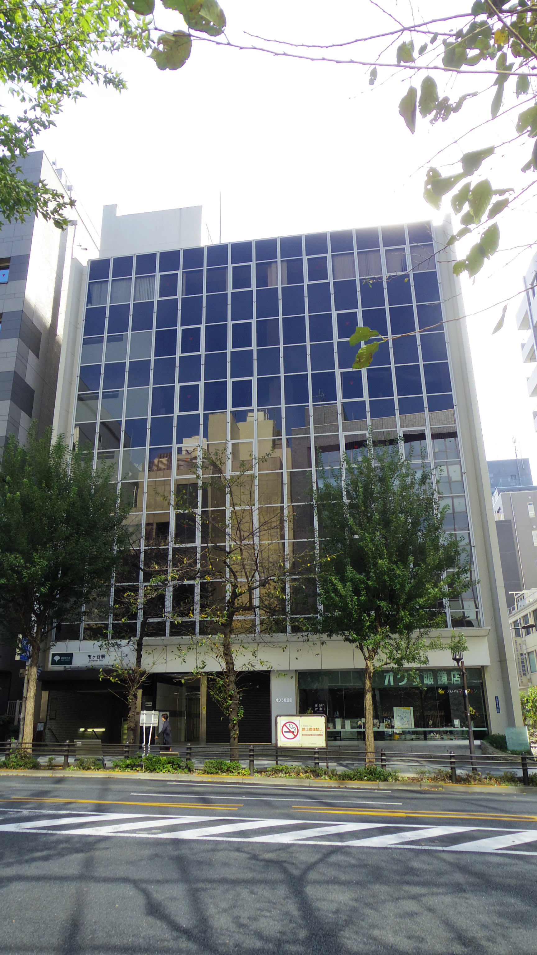 「オグラ眼鏡店」市ヶ谷店が入る市ヶ谷安田ビル（東京都千代田区九段南4-7-13）。2015年11月1日撮影。